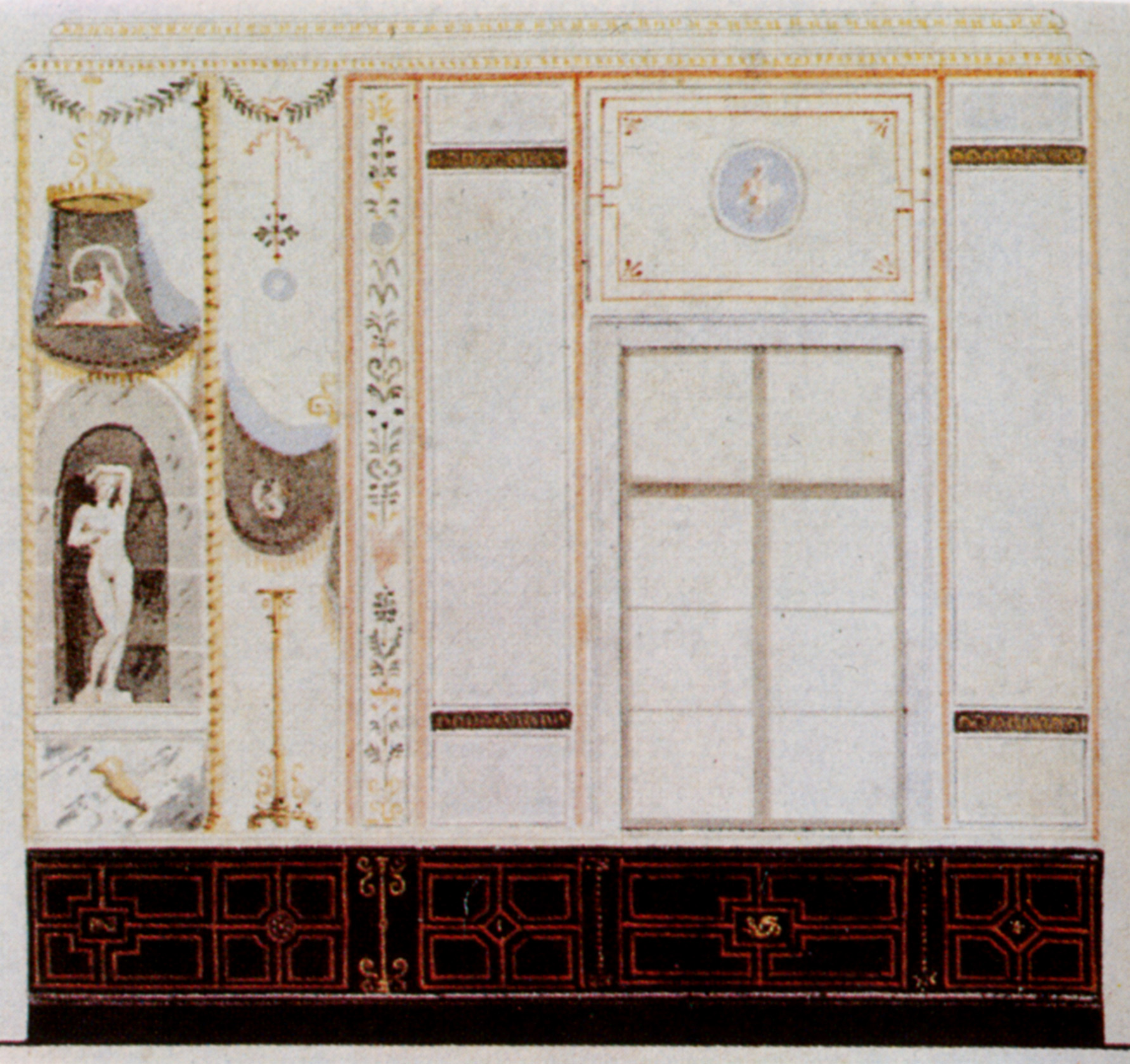 Klein Glienicke, Neugierde, Ausmalungsentwurf Schinkel 1825 b